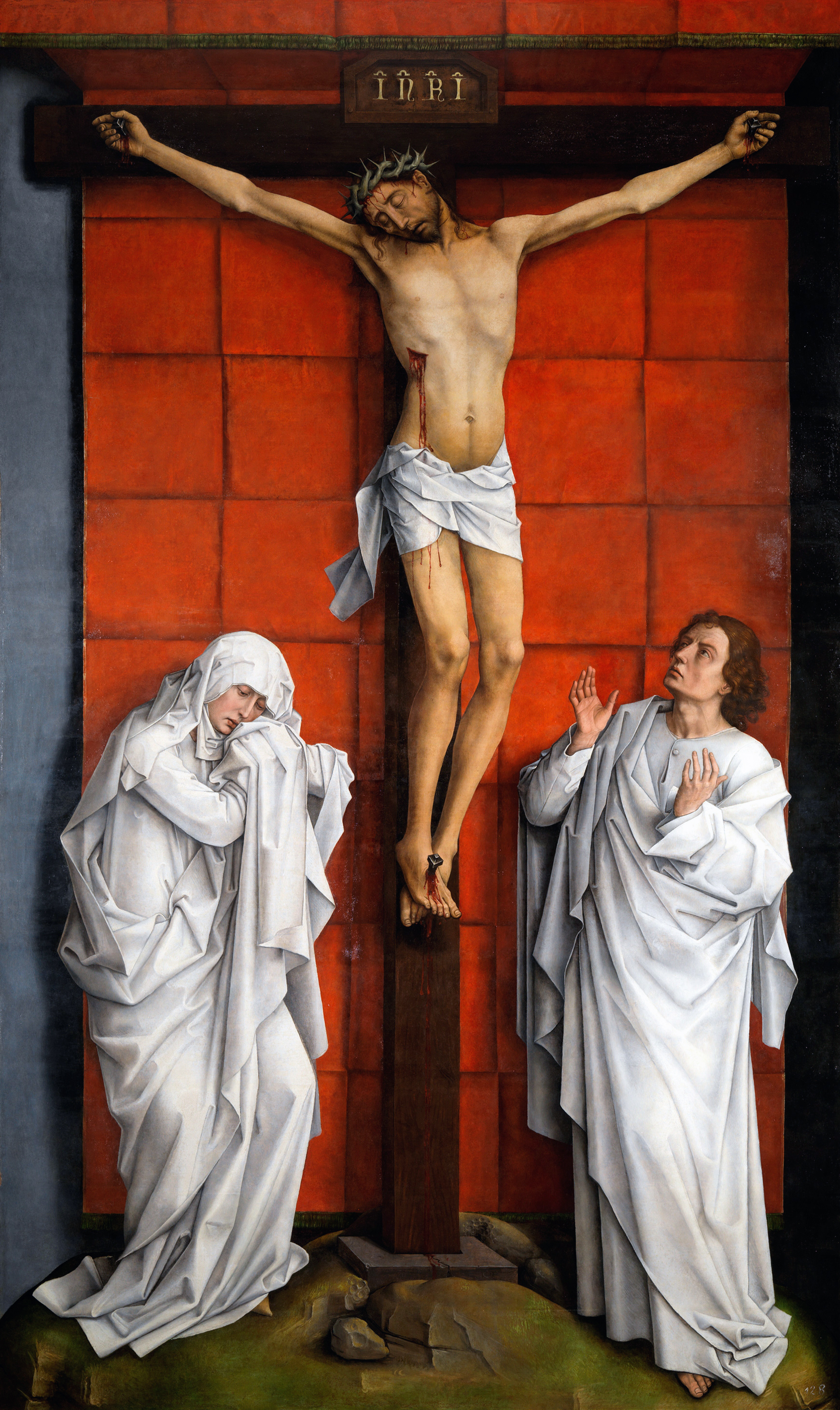 En el centro está la imagen de Cristo crucificado, teniendo forma de T la cruz y estando colocada bajo un falso dosel de color rojo. Y a los lados de la cruz están la Virgen María y San Juan, que contrastan debido a la blancura de sus vestidos.